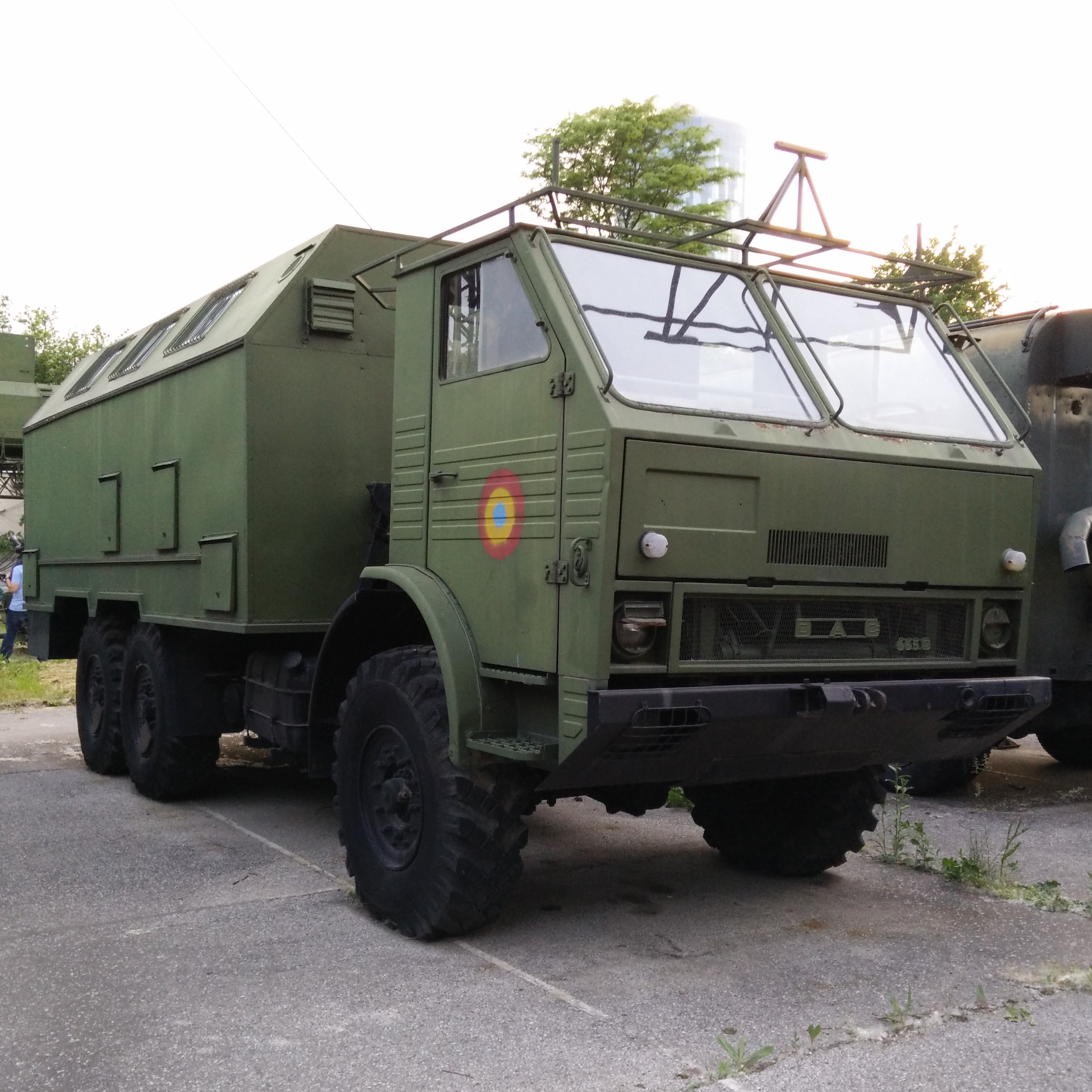 Autocamion DAC 665C expus la Muzeul Aviației din București. A fost folosit cel mai probabil ca stație radar.